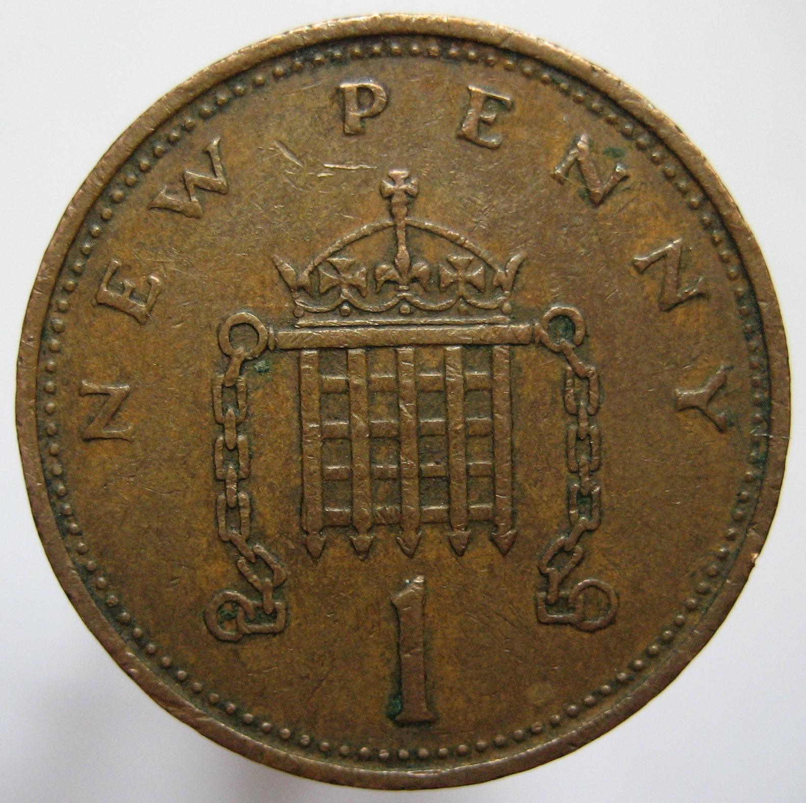 1 новый пенни 1971 года, Великобритания, реверс.